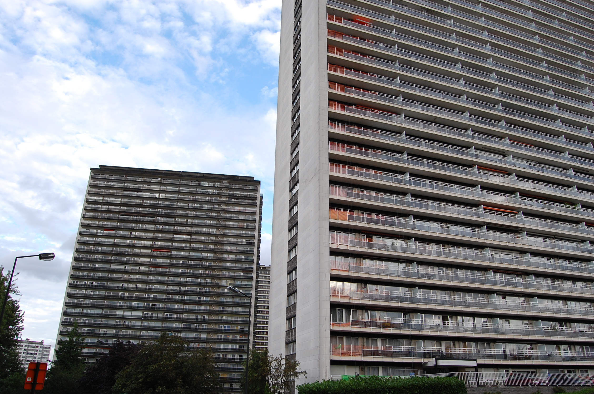 Tours de logement Amelinckx à Bruxelles